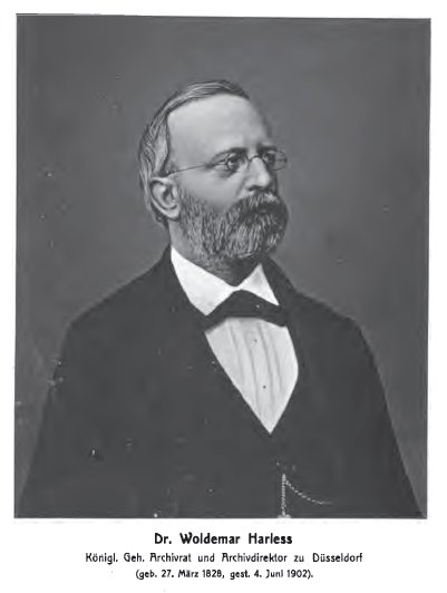 Woldemar Harless (1826-1902). In: Zeitschrift des Bergischen Geschichtsvereins. Band 36. Elberfeld: Hartmann, 1903